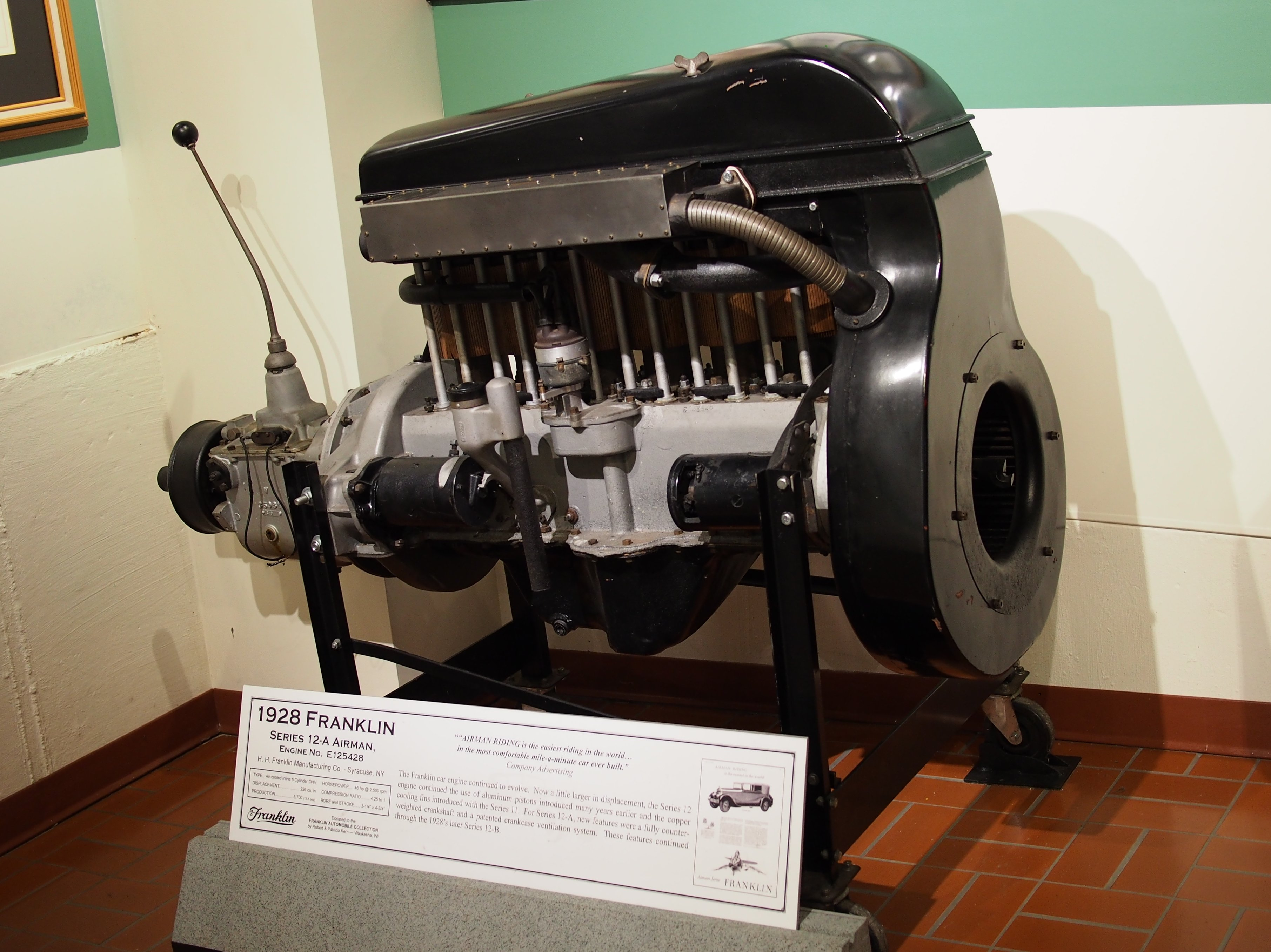 1928 Franklin Series 12-A Airman Engine